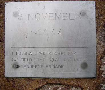 Tablica pamiątkowa na cześć 1 Dywizji Pancernej gen. Stanisława Maczka w Oosterhout w Holandii